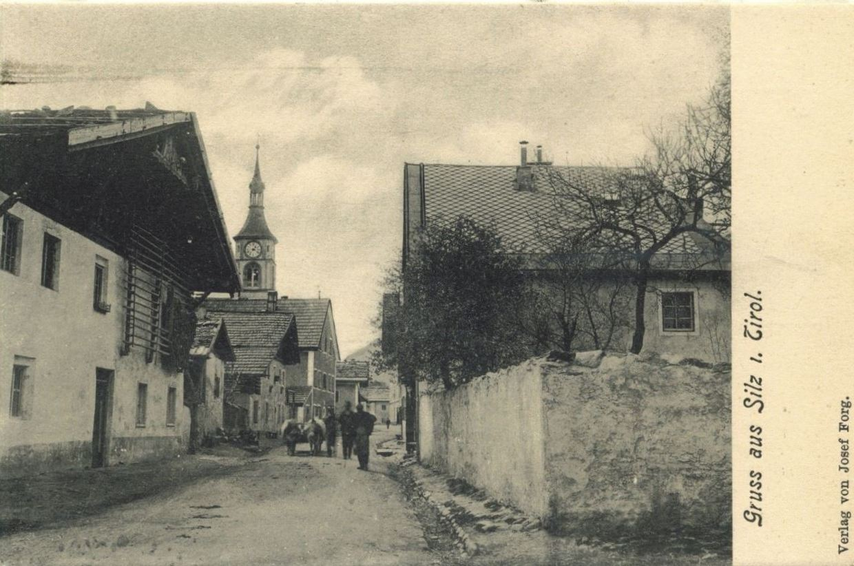 Silz um ca. 1900